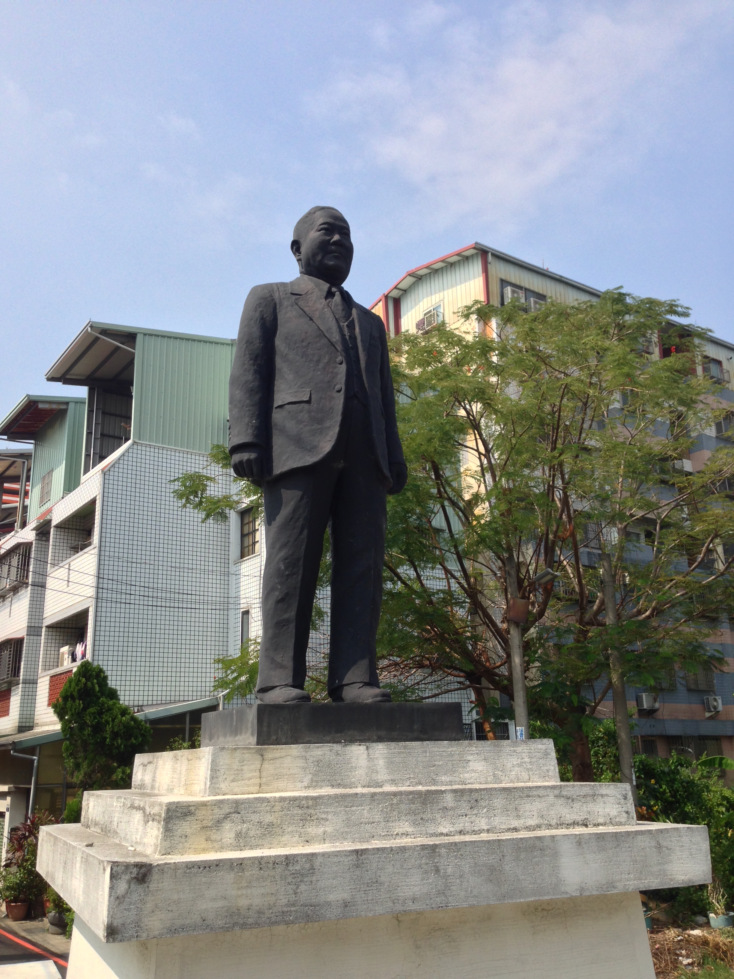 中文（台灣）: 曾秋霖銅像